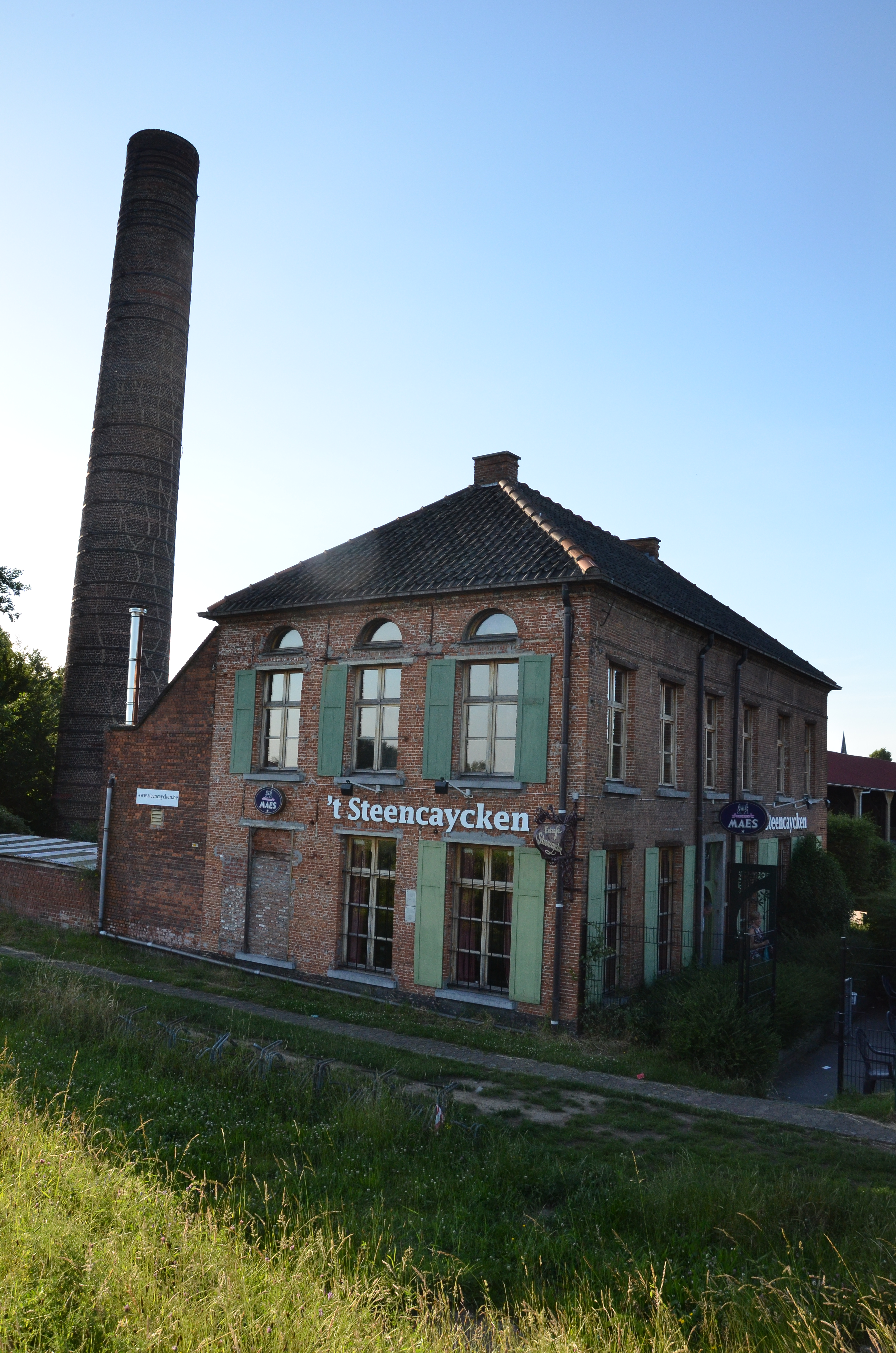 Voormalige meesterwoning van Steenbakkerij N.V. Klampsteen, nu taverne 't Steencaycken, Hoek 76, Boom